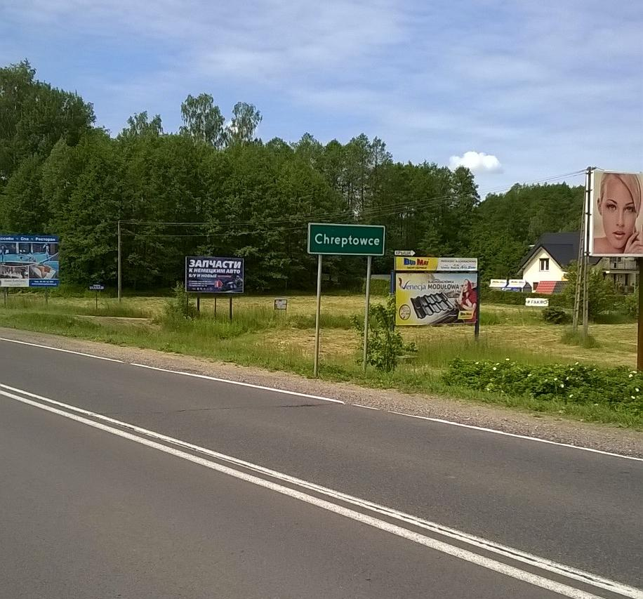 Вёска Хрэптоўцы ў Сакульскім павеце Падляшскага ваяводства Польшчы.